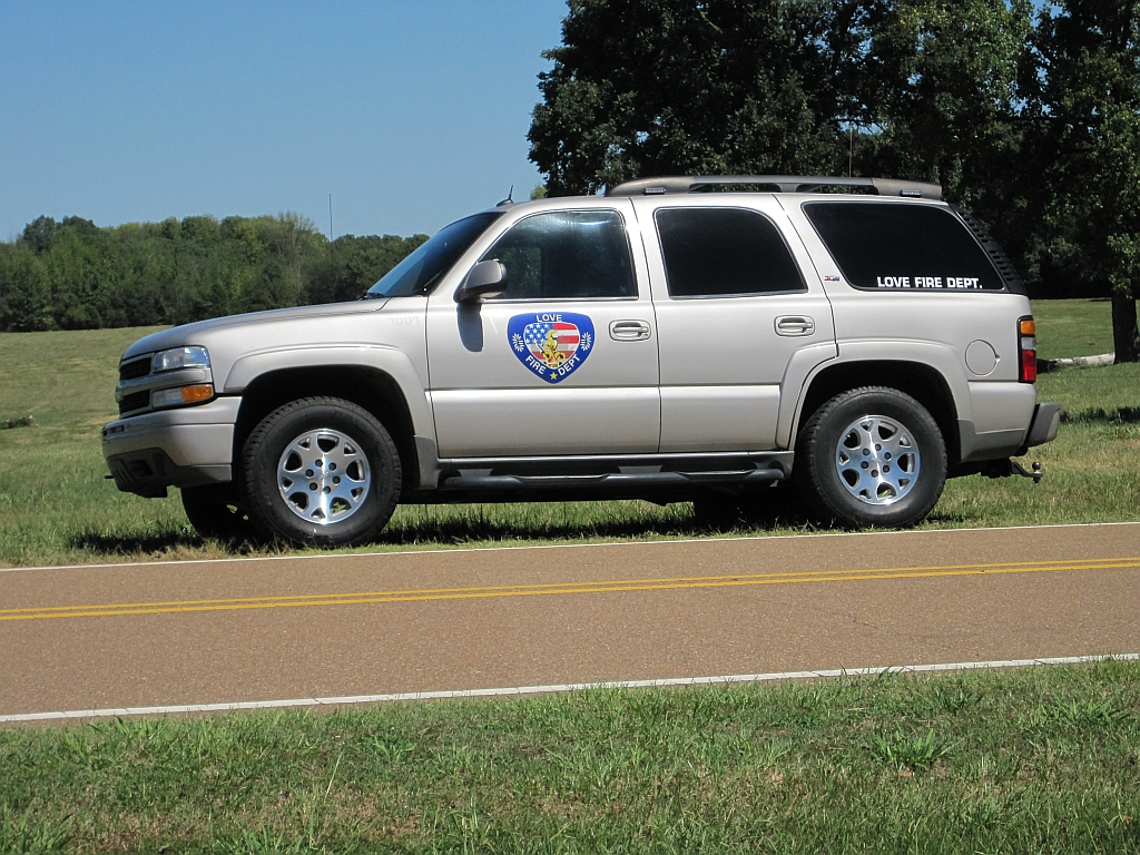 Fire Department vehicle in Love, Mississippi.